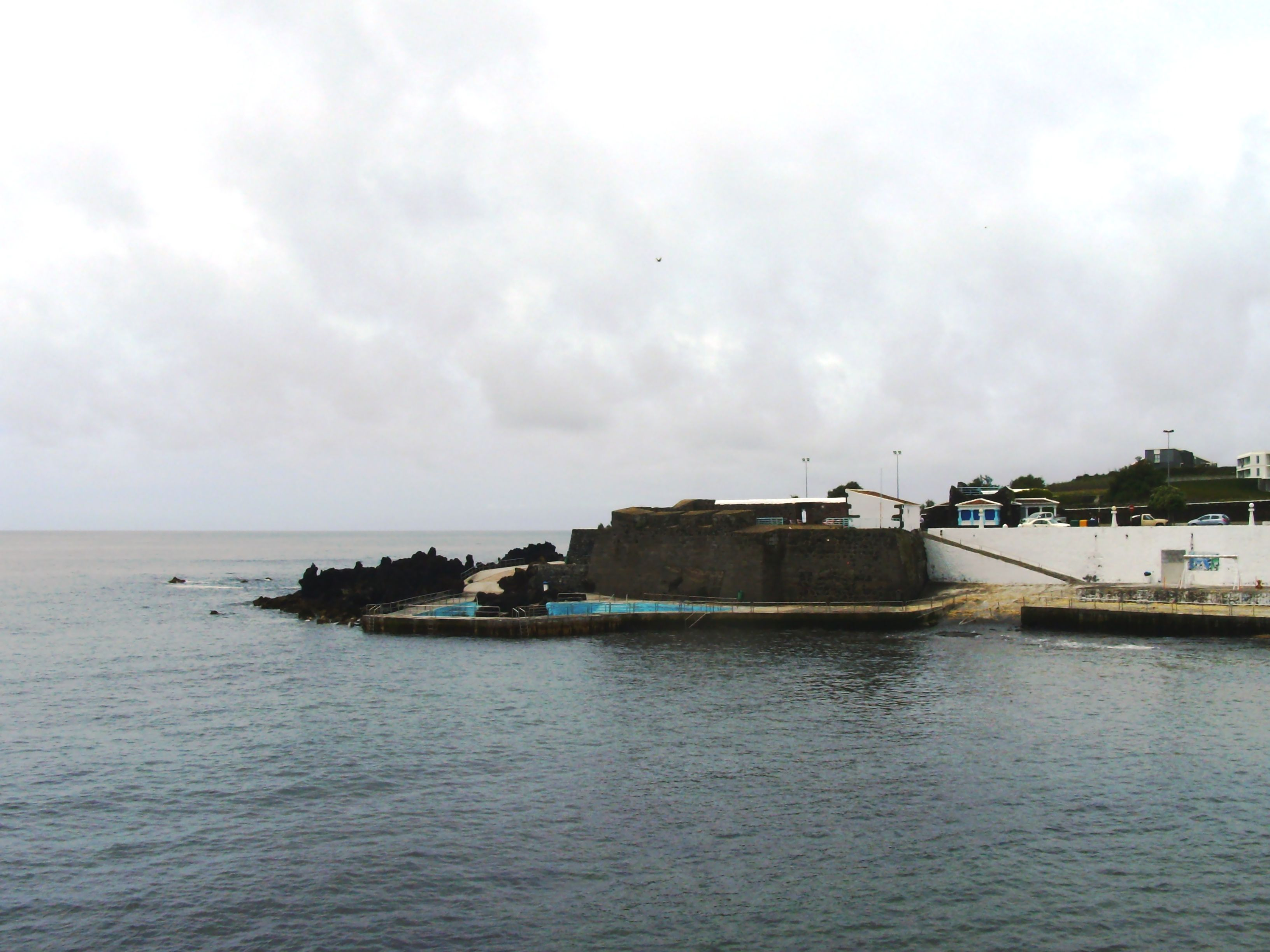 Forte do Negrito, São Mateus da Calheta, Angra do Heroísmo, Ilha Terceira, Açores.